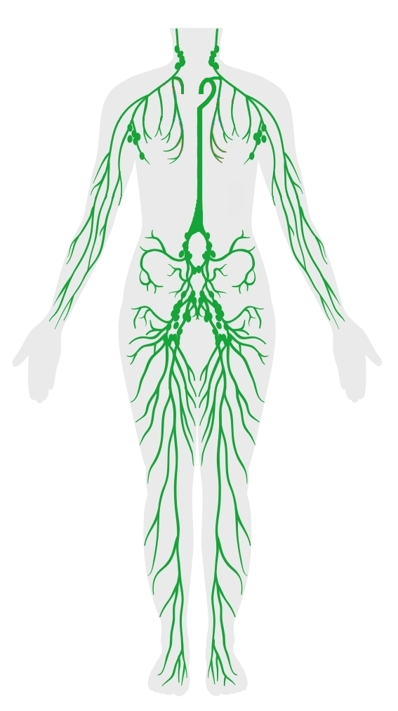 Esquema en el que se representa en color verde el sistema circulatorio linfático formado por los vasos linfáticos de todo el cuerpo.